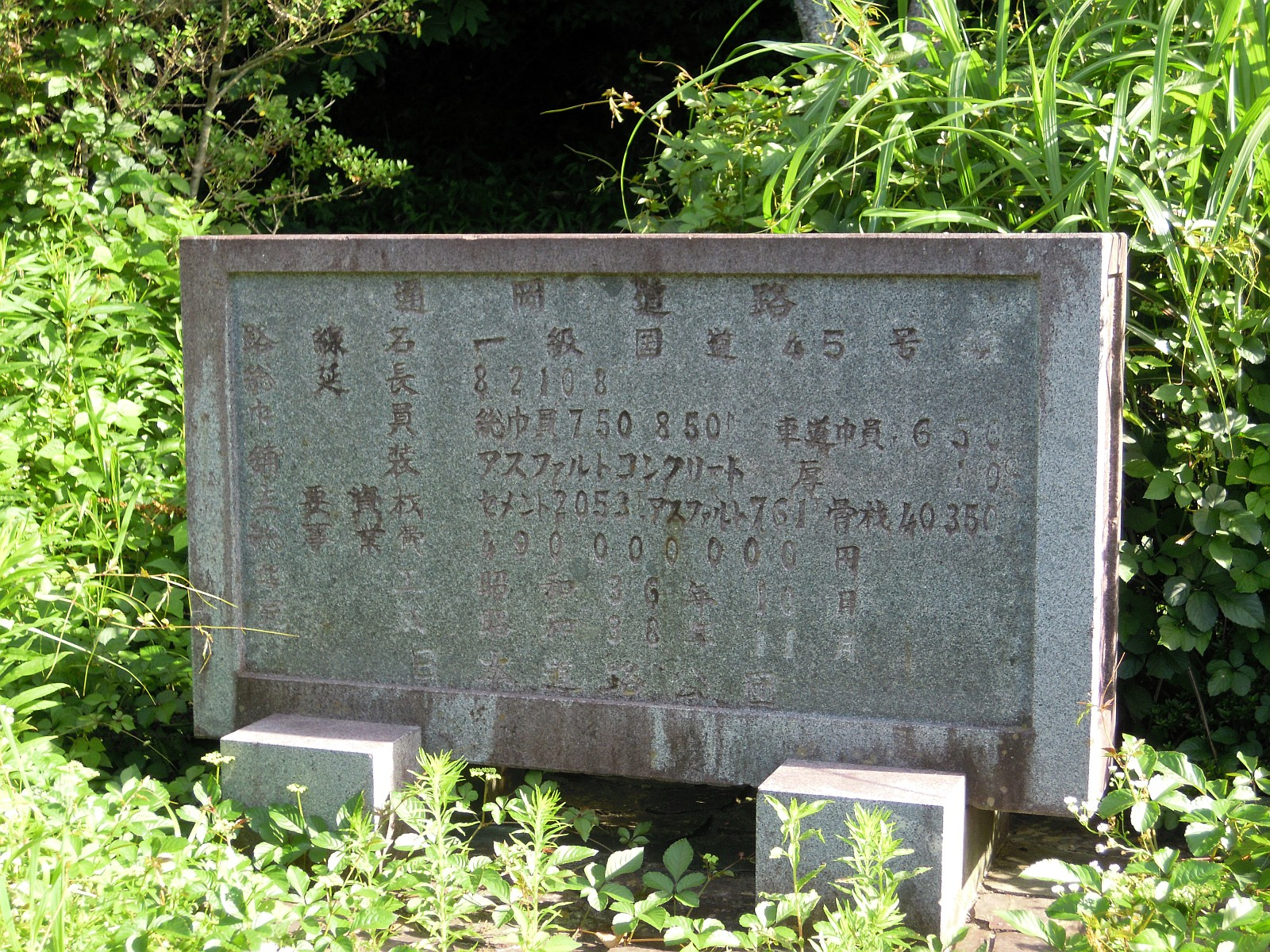 岩手県大船渡市にある通岡道路（現在は国道45号）の記念碑